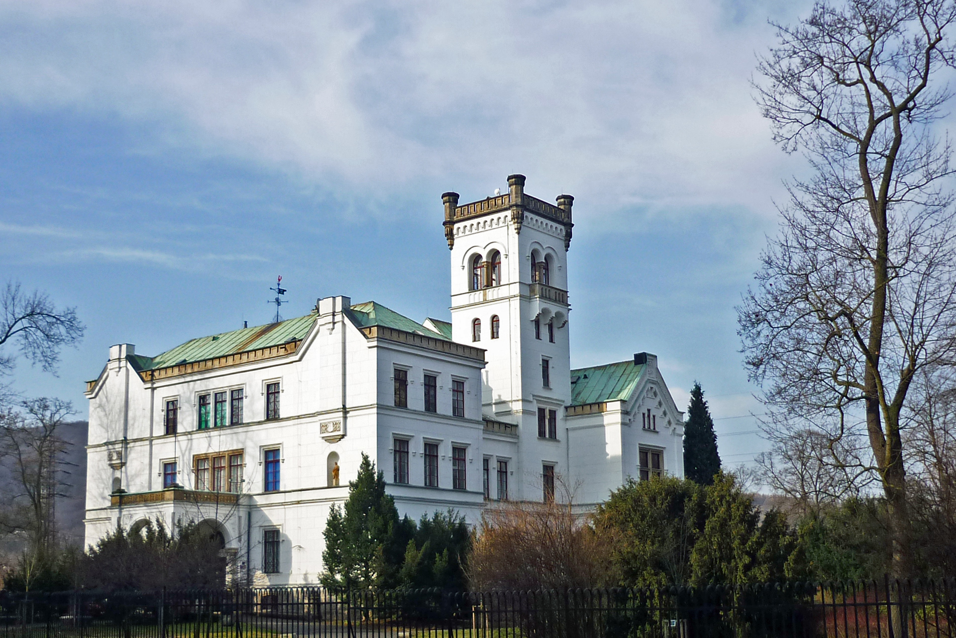 Schloss Türmitz (Trmice), Architekt: Heinrich von Ferstel